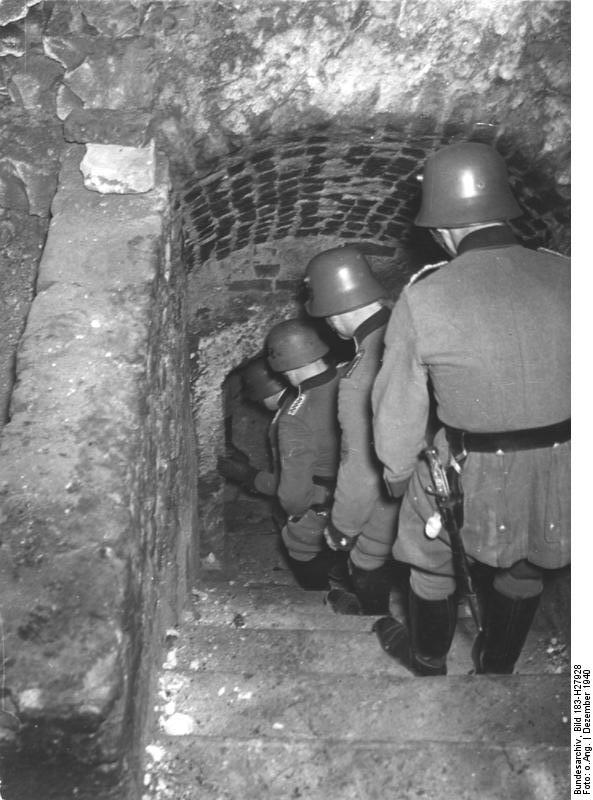 Polen, Ghetto Lublin, Polizei-Einsatz Zentralbild, II. Weltkrieg 1939-45 Im besetzten Polen, Dezember 1940. In verschiedenen Städten, unter anderem in Lublin haben die deutschen Faschisten Ghettos eingerichtet. Im Lubliner Ghetto befinden sich bis zu 20 Metern unter der Erde Gänge und Gewölbe. Hier haben die Juden ihre letzte Habe versteckt. Die deutsche Polizei ist bemüht, ihrer habhaft zu werden. UBz: Die Polizei, geführt von einem Juden der sich bei einem Verhör eine Blöße gegeben hat, steigt endlos scheinende Treppen hinab in die unterirdische Stadt, um ein geheimes Warenlager auszuheben. 120-46